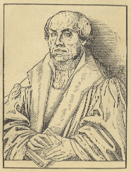 Friedrich Myconius //zeitgenössisches Bild//Kopie: Archiv Helms//public domain Holzschnitt in: Cyriacus Sneegass 1593 u. 1596